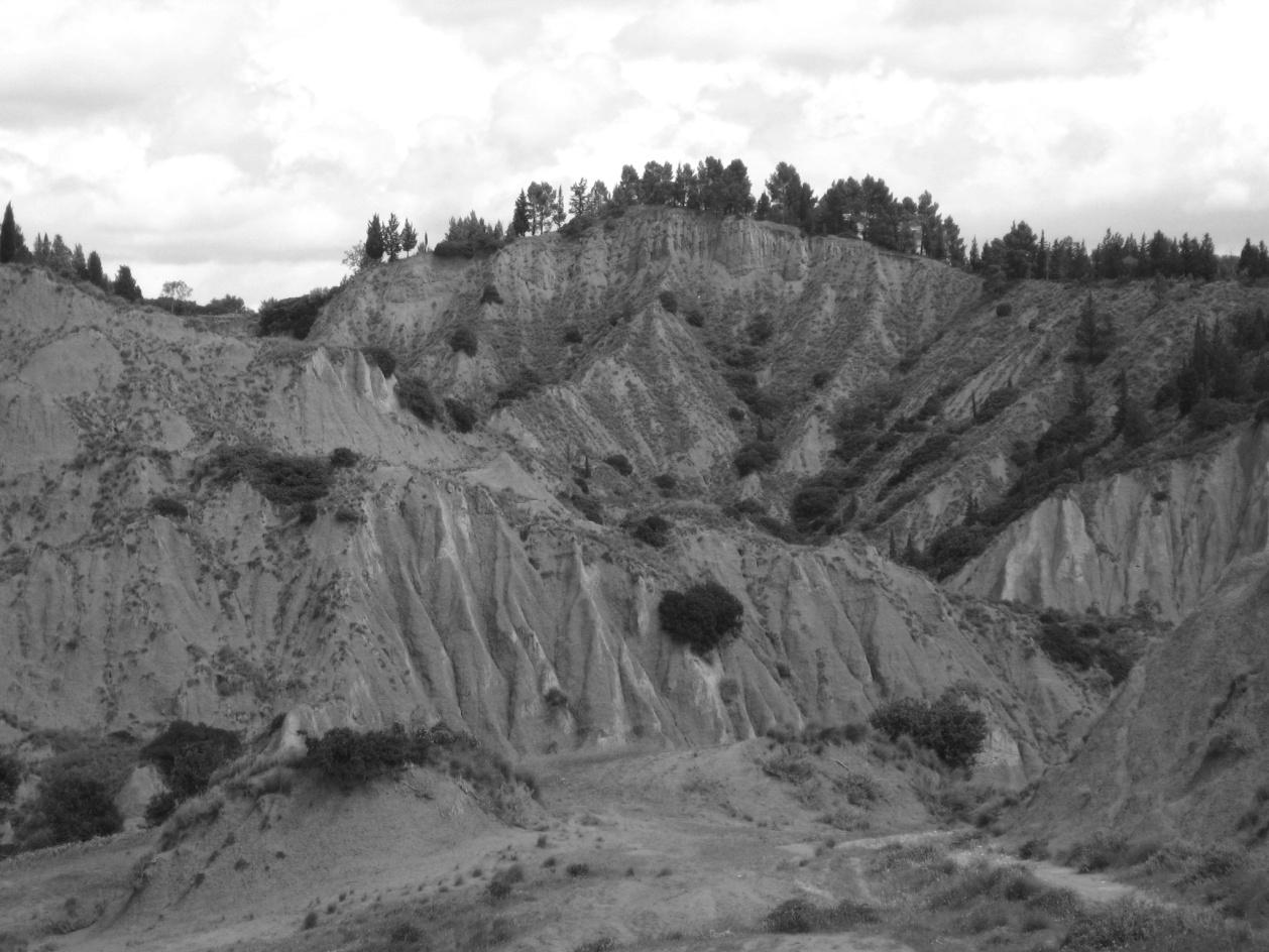 Calanchi di Aliano, Basilicata.